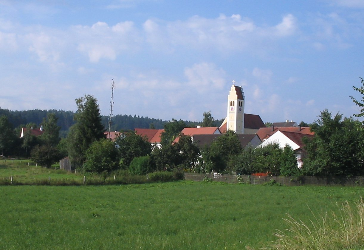 Panorama von Göbelsbach